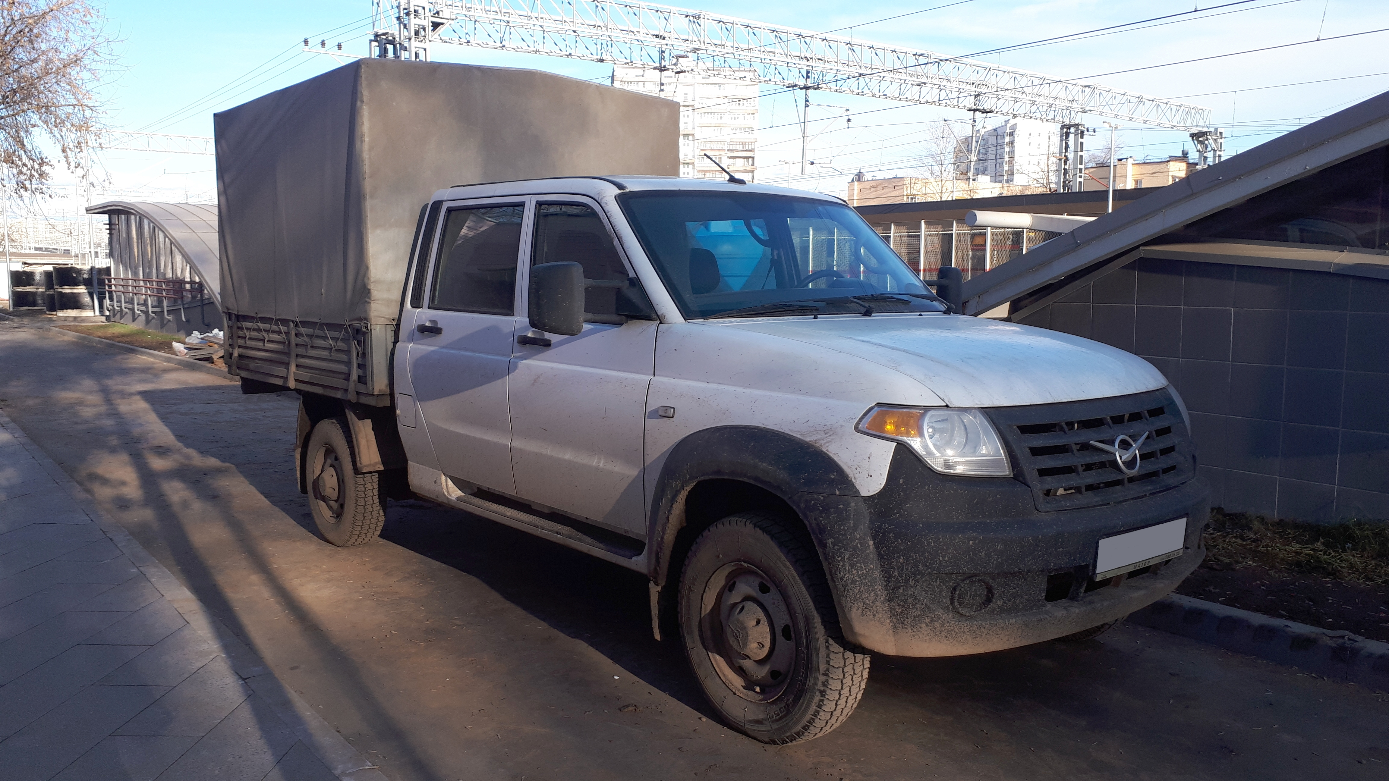 УАЗ-23632.